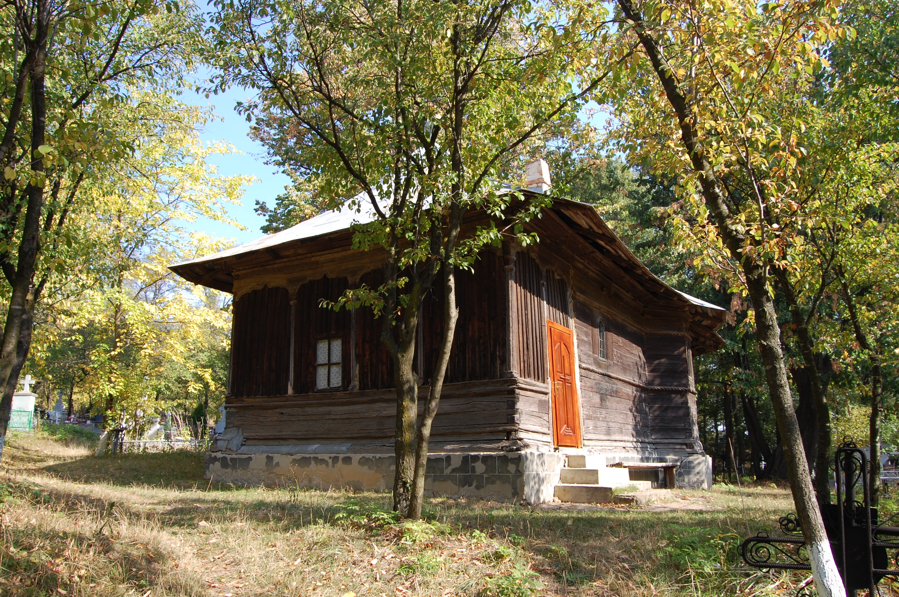 Biserica de lemn Sf. Gheorghe din Lipovăţ, Vaslui. 9 octombrie 2009